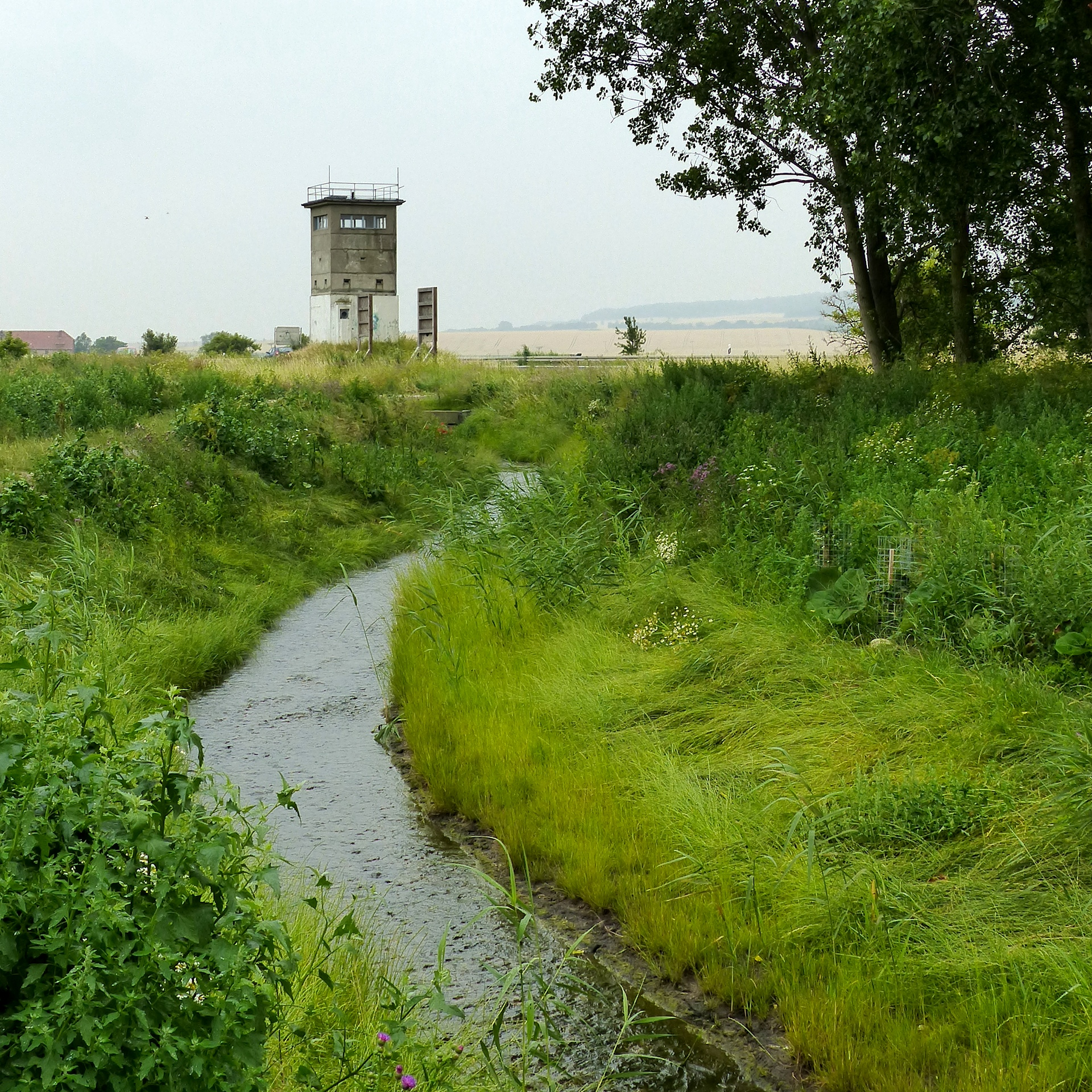 Deersheimer Aue am ehemaligen Grenzpunkt Mattierzoll am Hessendamm, im Hintergrund der Große Fallstein.